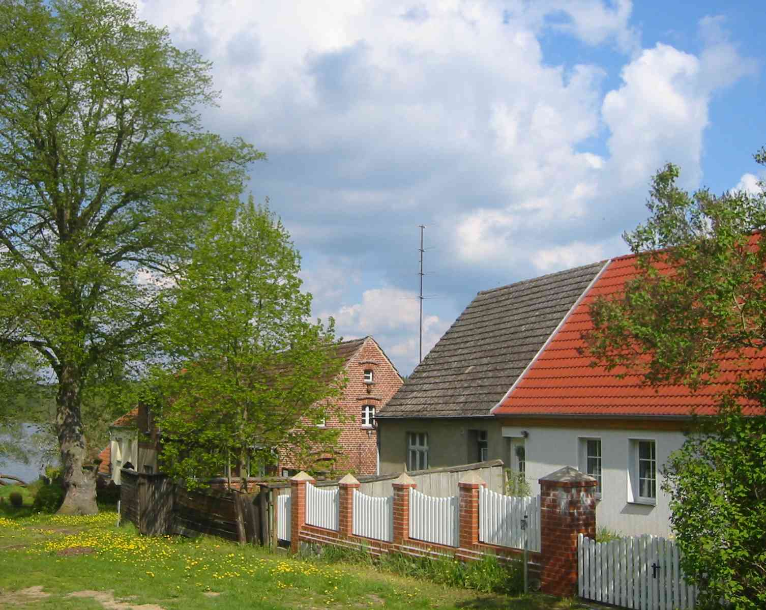 Häuserzeile am unteren Dorfplatz von Zermützel